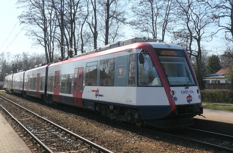 Elektryczny zespół trakcyjny Pesa Mazovia EN95-01 oczekuje na stacji Grodzisk Mazowiecki Radońska na odjazd jako pociąg WKD 144 do Warszawy Śródmieście WKD.